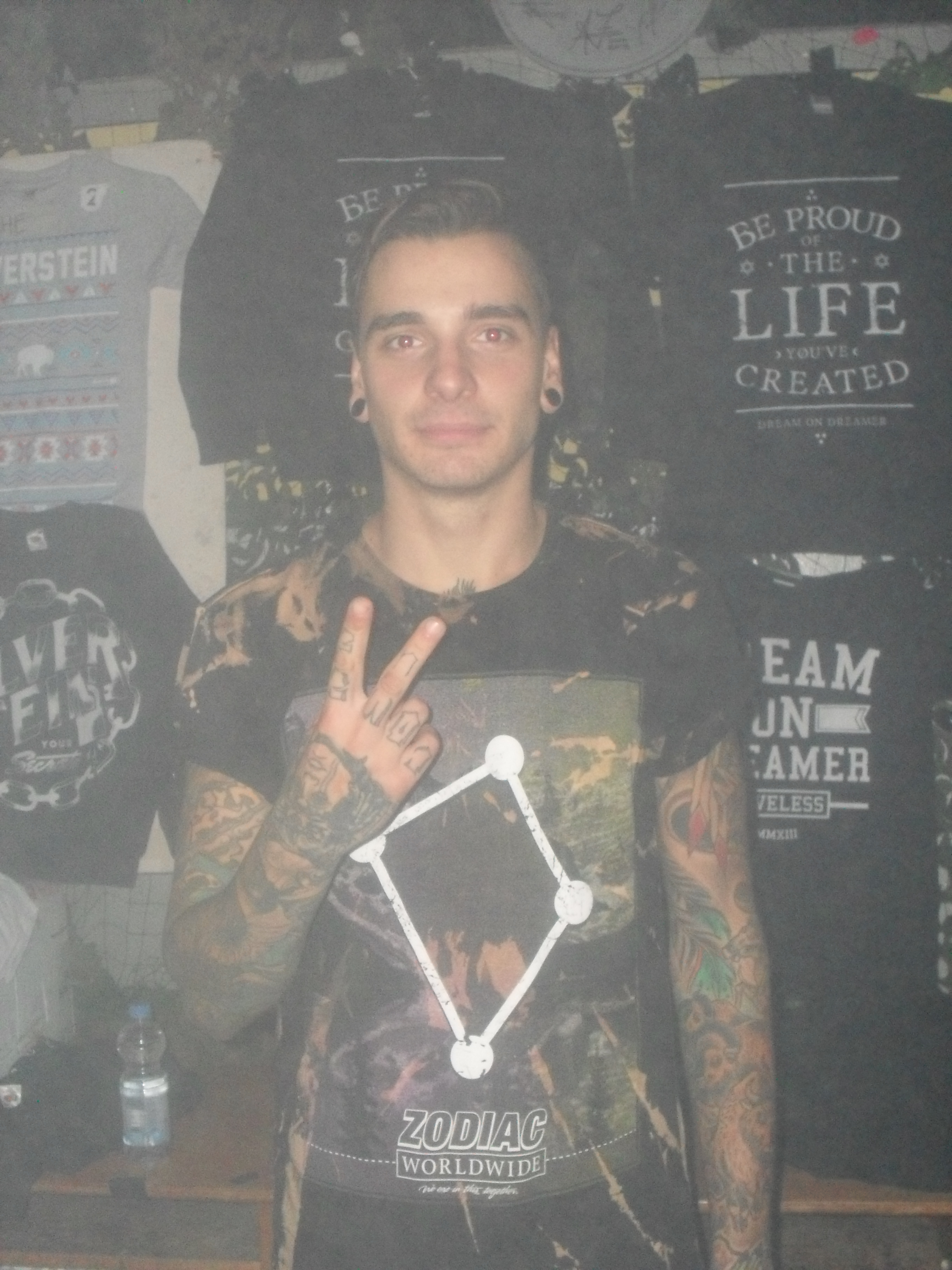 Marcel Gadacz von Dream On nach einem Konzert in Köln.